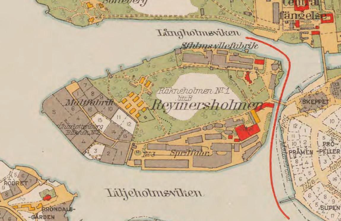 Kartblad ”Staden” ur Stockholms stad med omnejd i 12 blad, visande Reimersholme